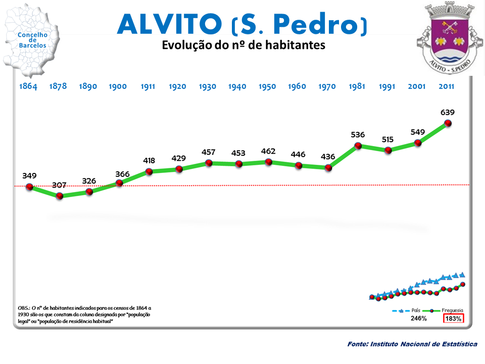 Censos 1864-2011